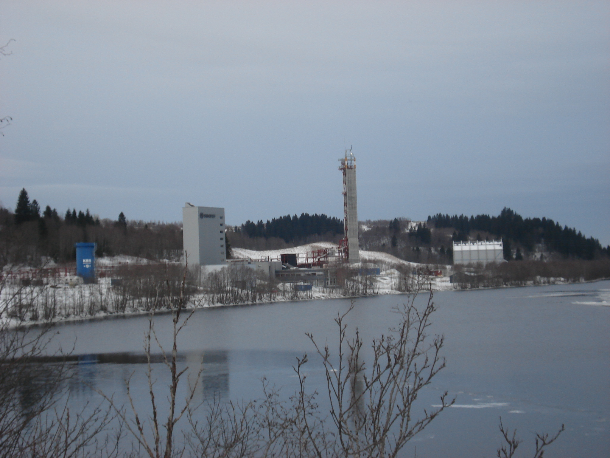 Tofaseanlegget på Tiller i Trondheim